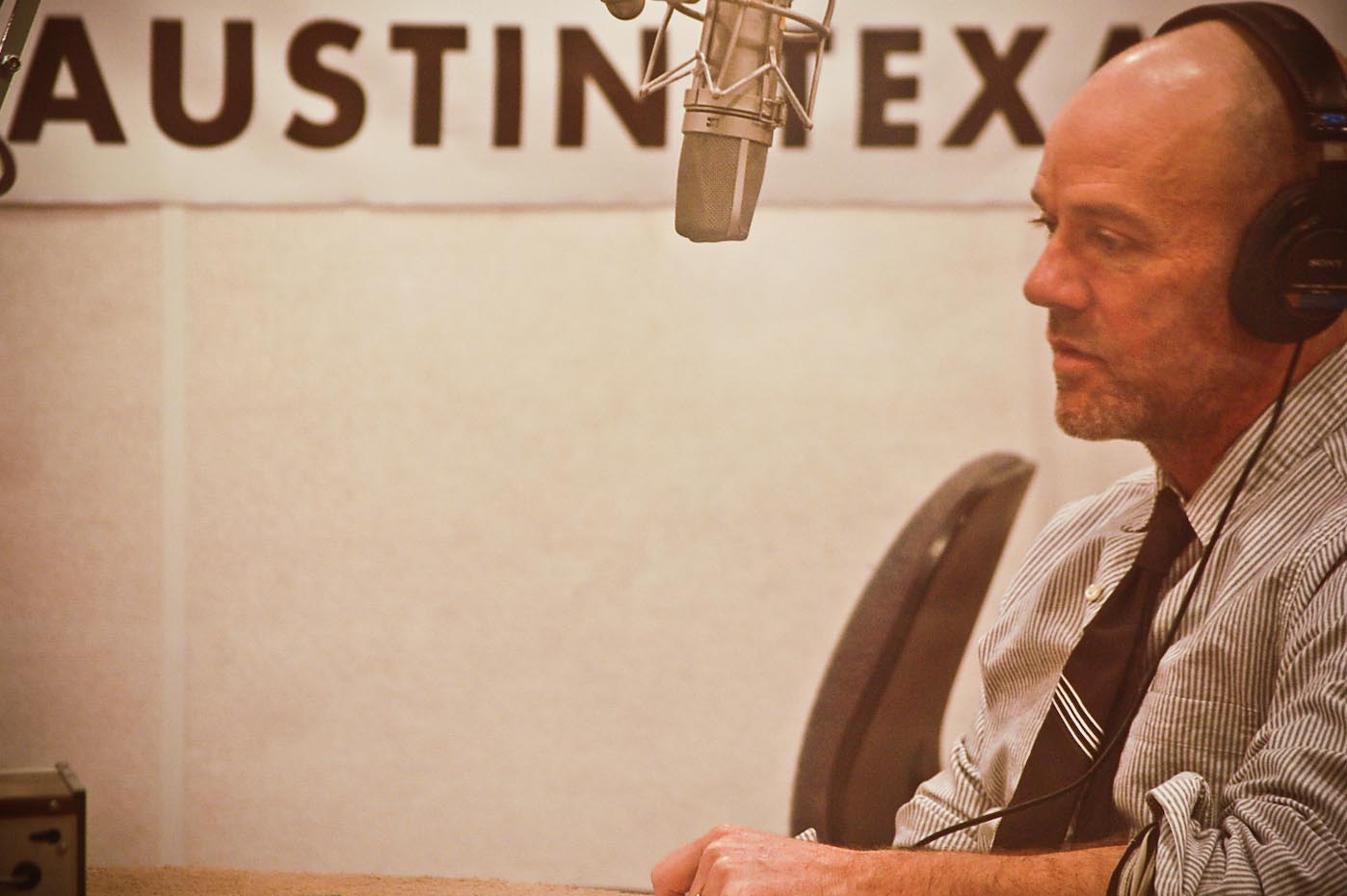 Fresh Air with R.E.M. Esta imagen, sustituirá temporalmente, a la portada de Accelerate, disco de R.E.M.